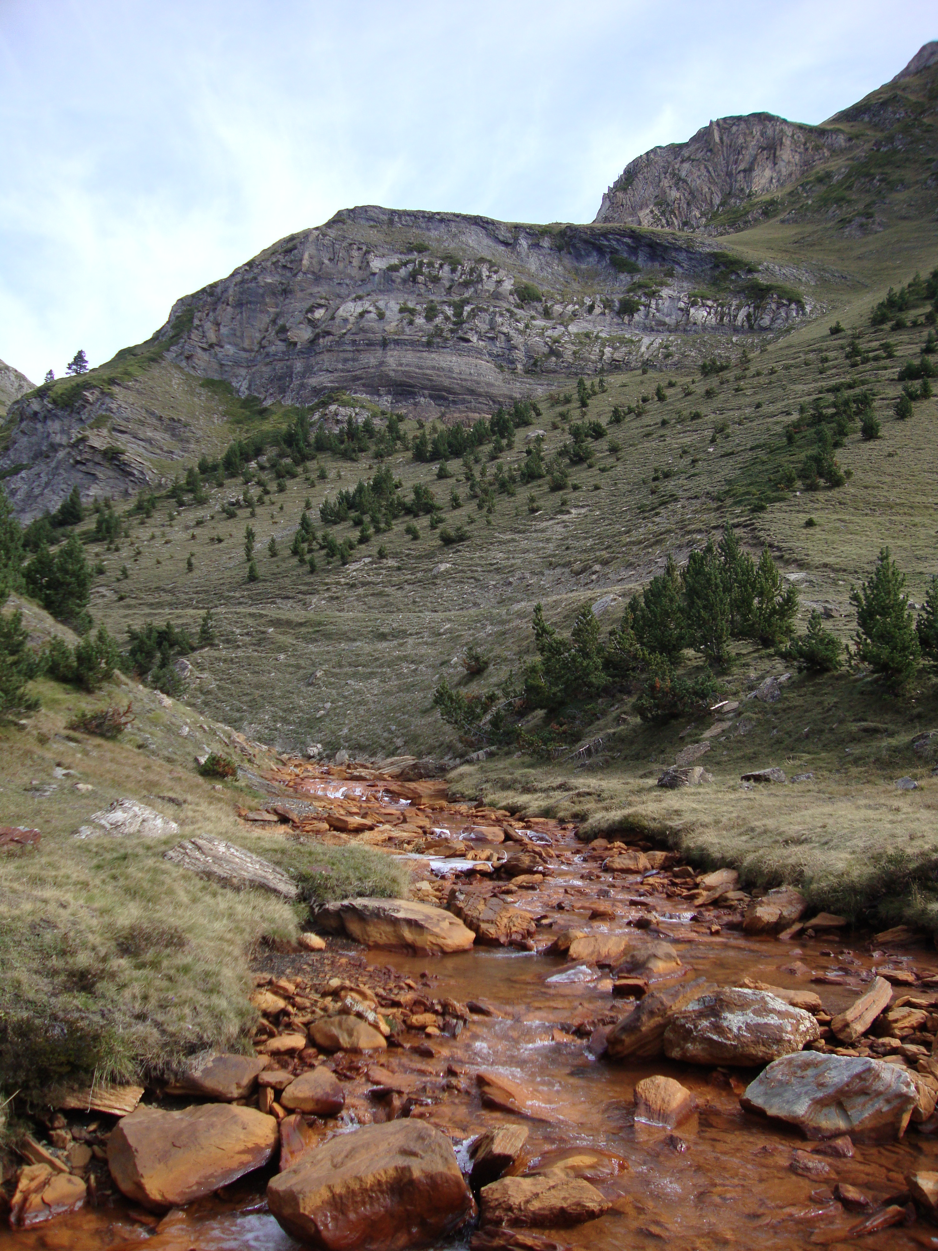 Río Unhòla en el Valle de Arán